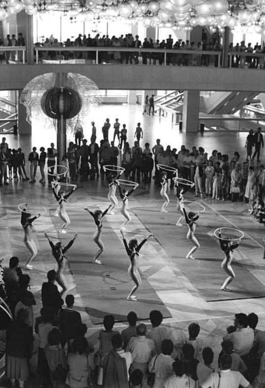 Berlin, Palast der Republik, Turndarbietung ADN-ZB Link 20.7.86 Berlin: Mit seinem Programm bot das Sportensemble Lokomotive Elsterwerda - "Verdientes Volkskunstensemble der DDR" - dem Publikum im Palast der Republik einen Vorgeschmack auf das 8. Turn- und Sportfest im kommenden Jahr.